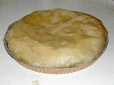 pastilla10 Photo sous gfdl, prise par Etape de réalisation de la recette de la pastilla. Anthere